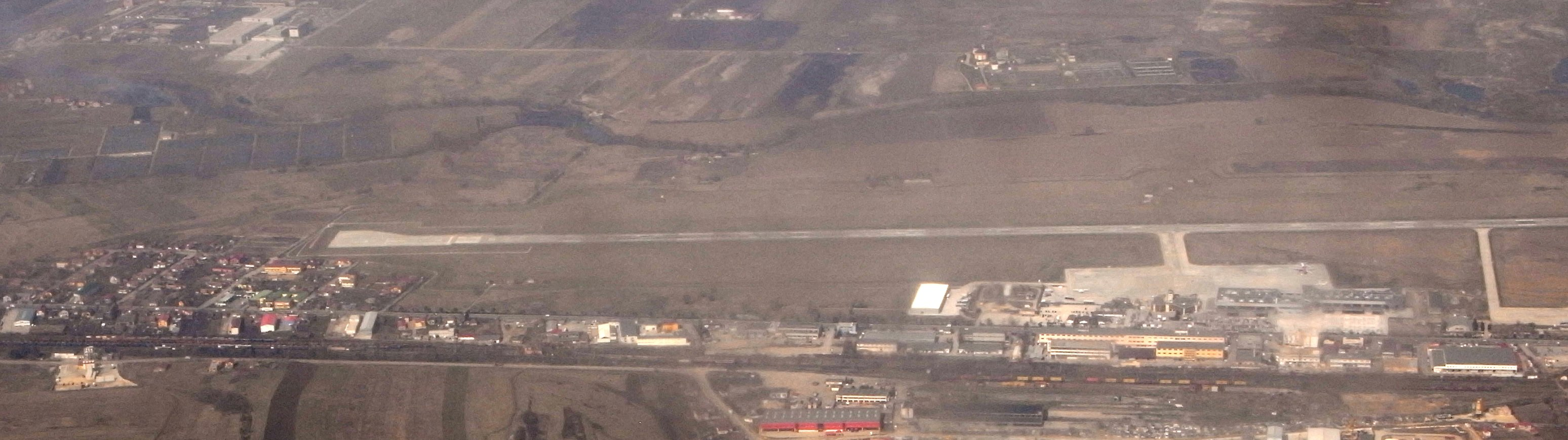 Flughafen Klausenburg/Kolozsvár, Luftaufnahme von Süden